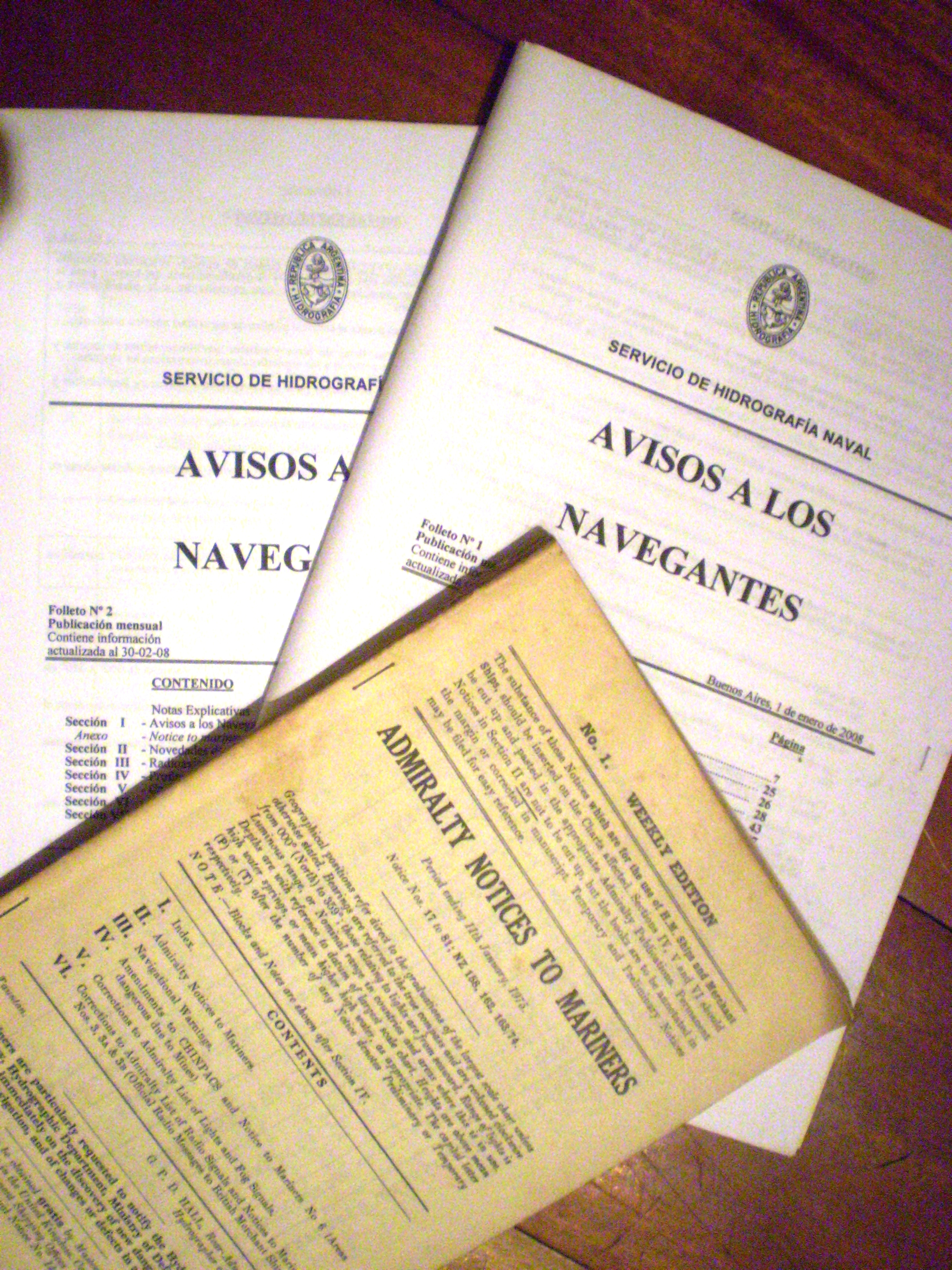 Ejemplares de los boletines de aviso a los navegantes de Argentina y notice to mariners ingleses